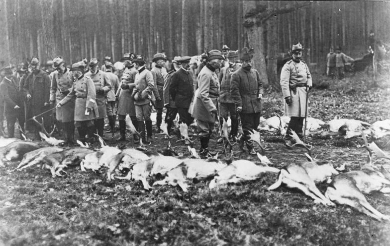 ADN-ZB/Archiv Deutschland Zar Nikolaus II. von Rußland (2.v.r.) besuchte 1910 Deutschland. Mit Kaiser Wilhelm II. von Deutschland (r.) nahm er an einer Hofjagd teil. Hier die Monarchen bei der Besichtigung der Strecke